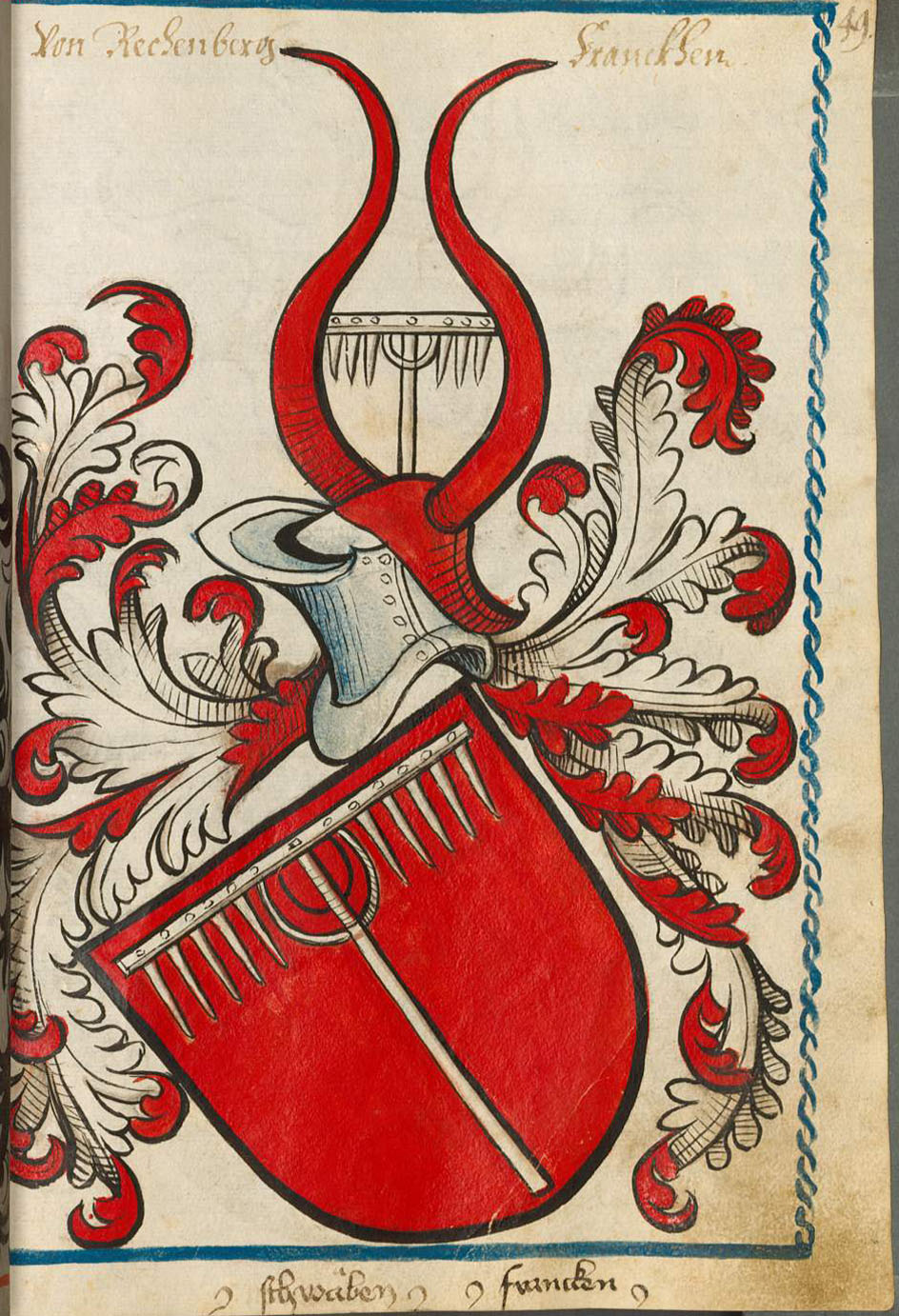 Scheibler'sches Wappenbuch, älterer Teil Von Rechenberg Franckhen Wappen der Familie von Rechenberg.